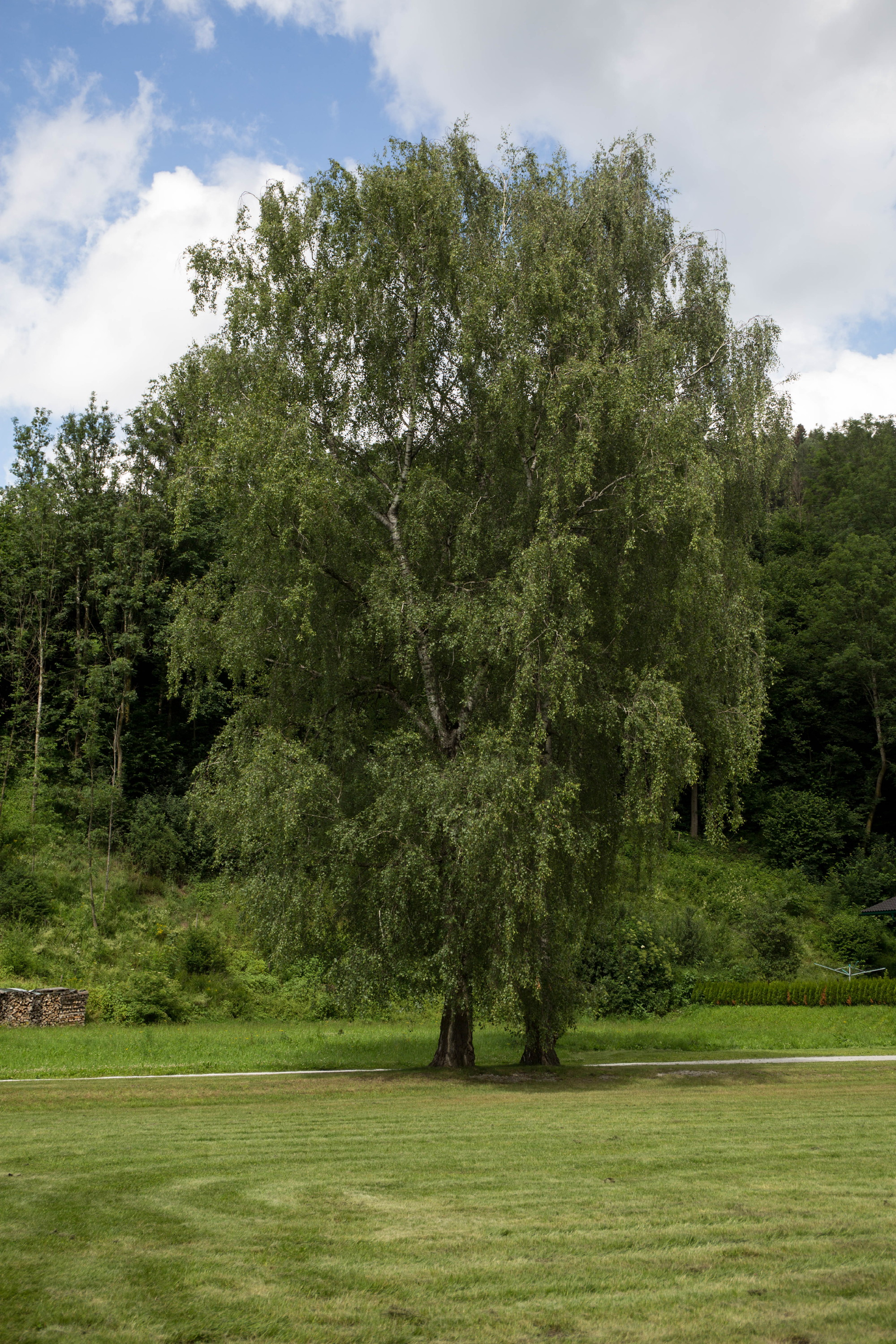 2 Hängebirken (Betula pendula) This media shows the natural monument in Styria with the ID 956.